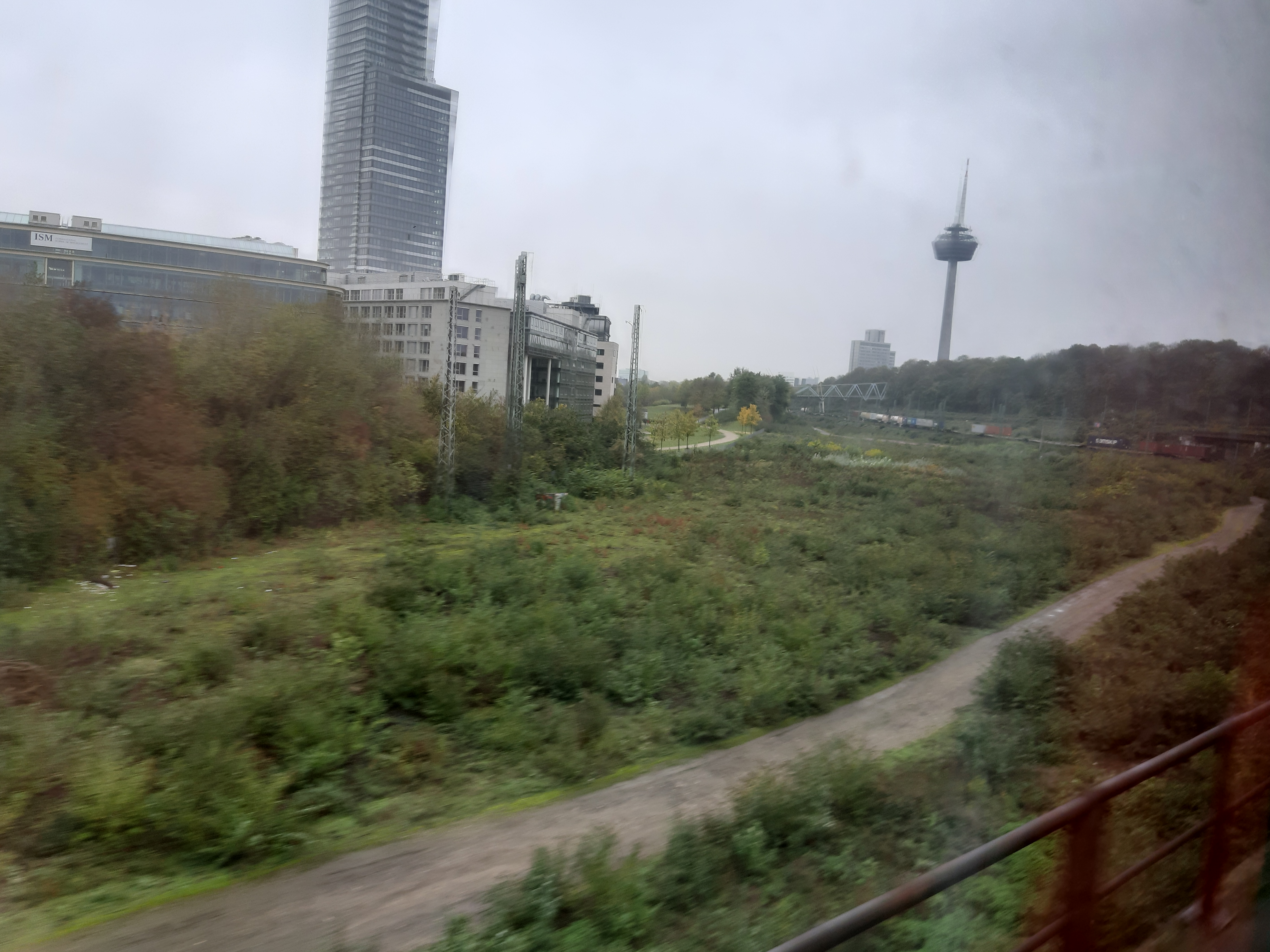 Die weiten mit Gestrüpp bestandenen ebenen Flächen gehörten zu dem 1990 stillgelegten Güterbahnhof Köln Gereon, ebenso die linke Häuserzeile. An den drei dicht beisammen stehenden Oberleitungsmasten hingt jahrelang ein Schild, das auf den geplanten Mediapark hinwies. Im Hintergrund ist ein Containerzug zu erkennen, der gerade von Köln-West (links) nach Köln-Ehrenfeld (rechts) fährt. Aufgenommen aus einem Personenzug von Köln-West nach Köln Hbf.